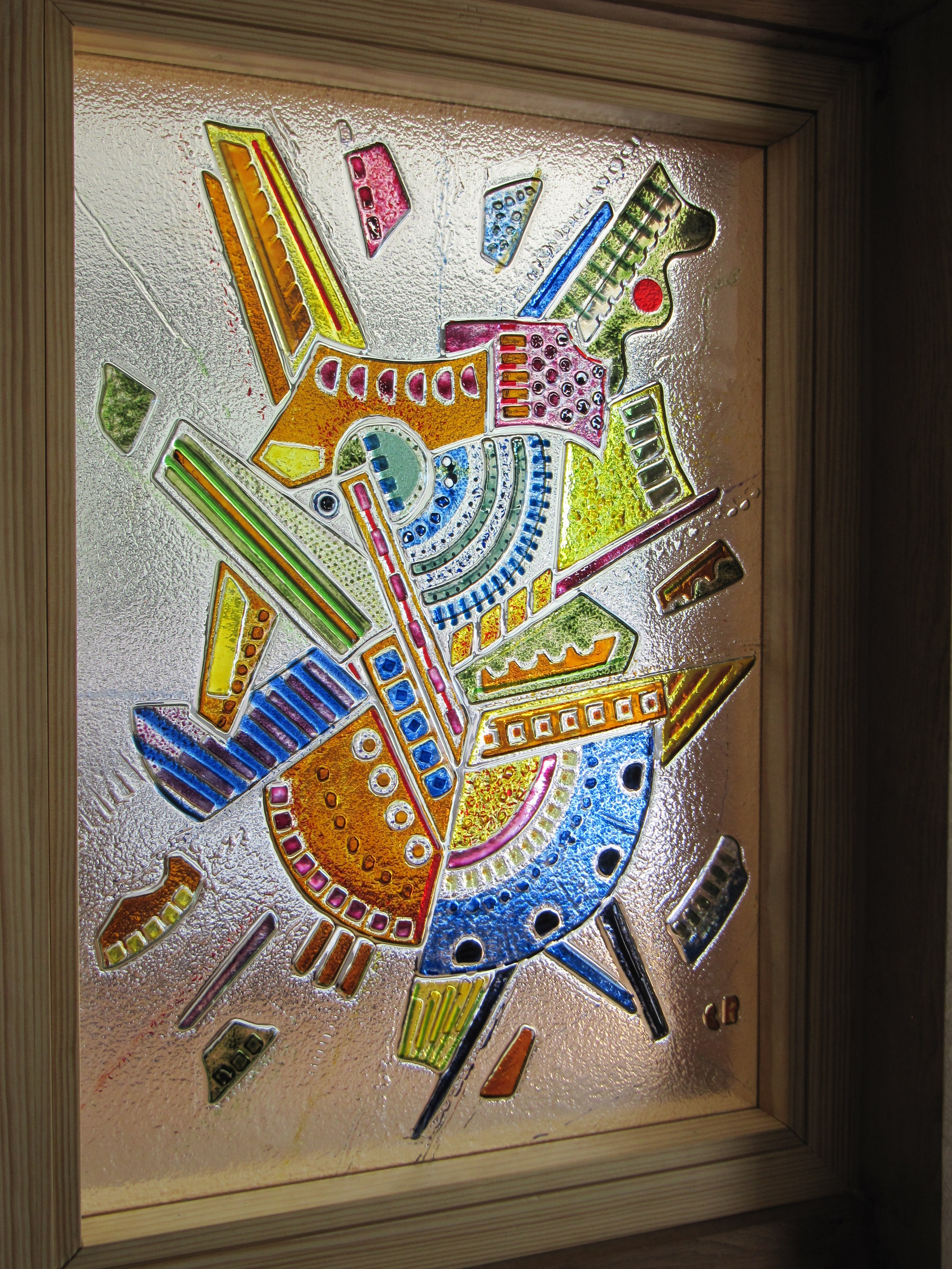 une création de Carlo Roccella.